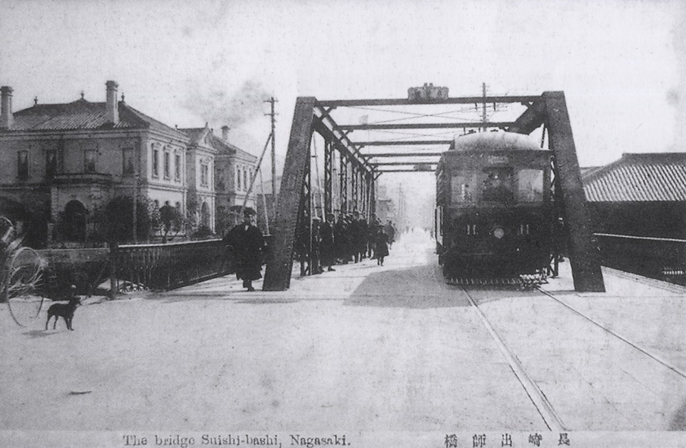 大正時代頃の出師橋。橋上を走る電車は長崎電気軌道の11形電車。